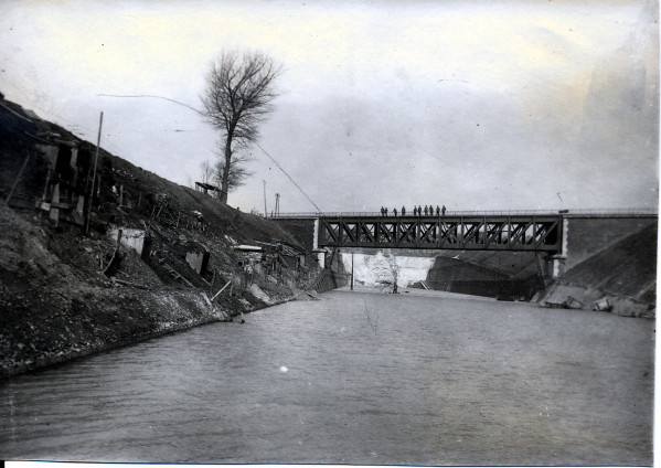 Le pont sur le canal du nord.